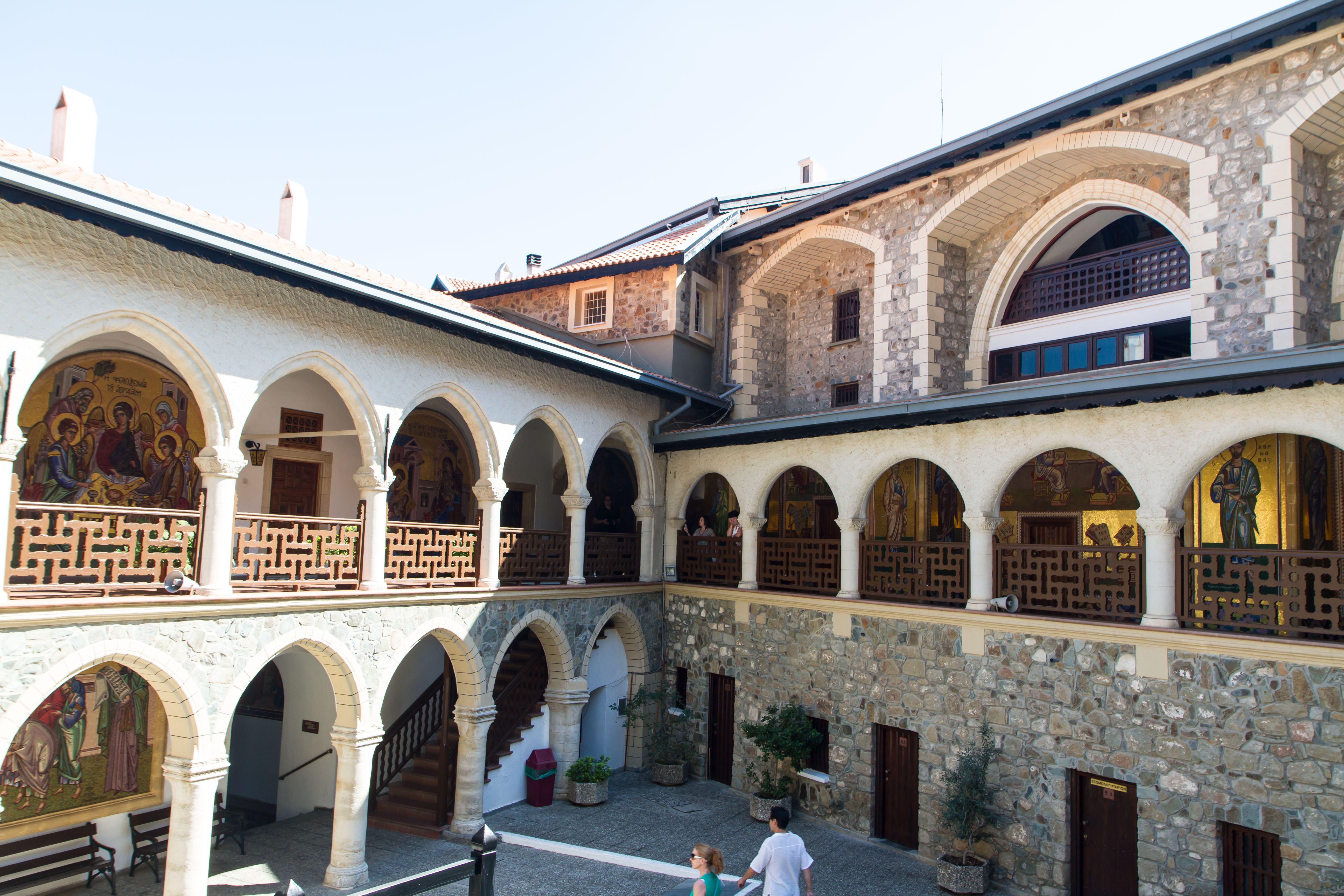 Nicosia, Cyprus